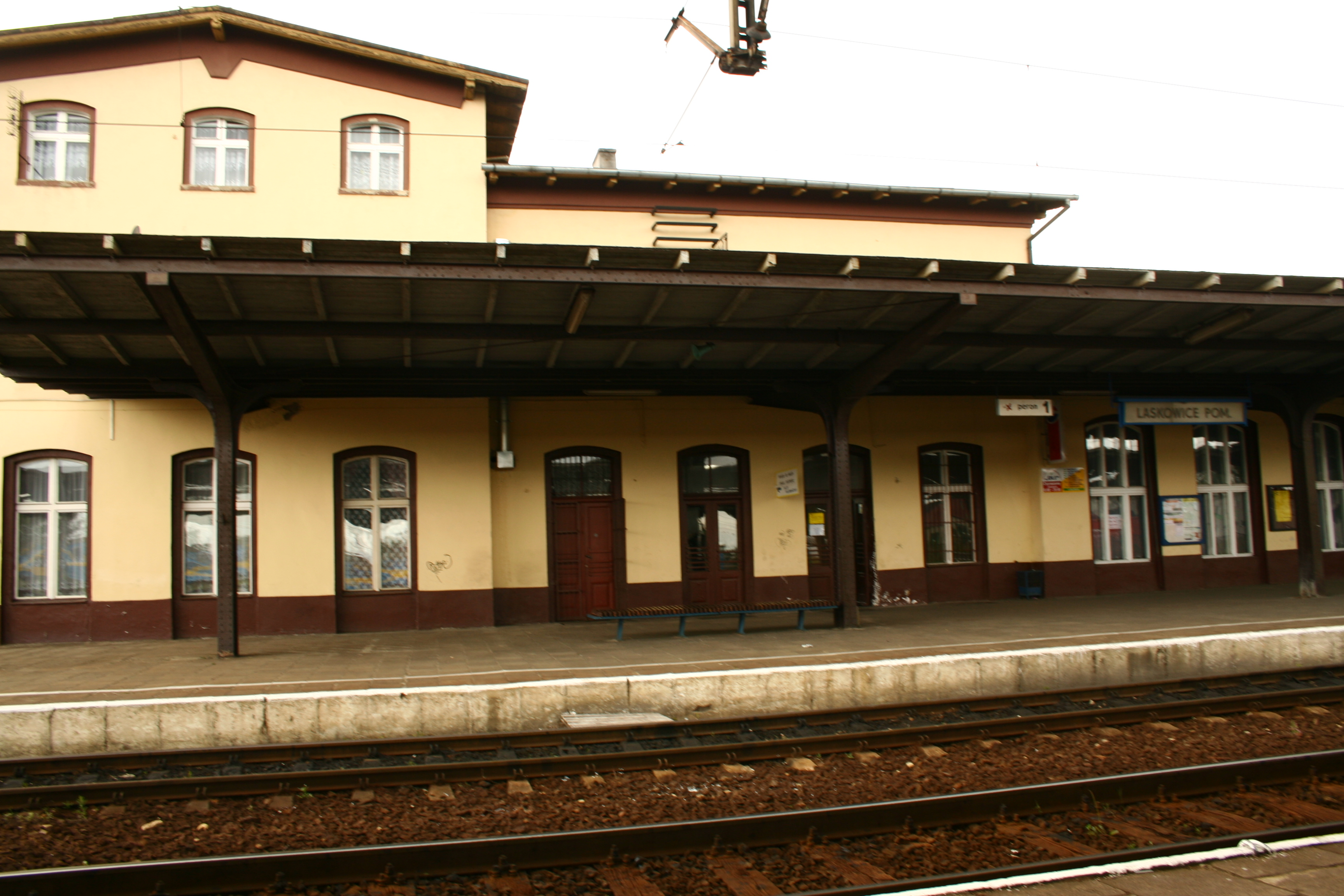 Laskowice Pomroskie (stacja kolejowa). Widok od strony peronów.